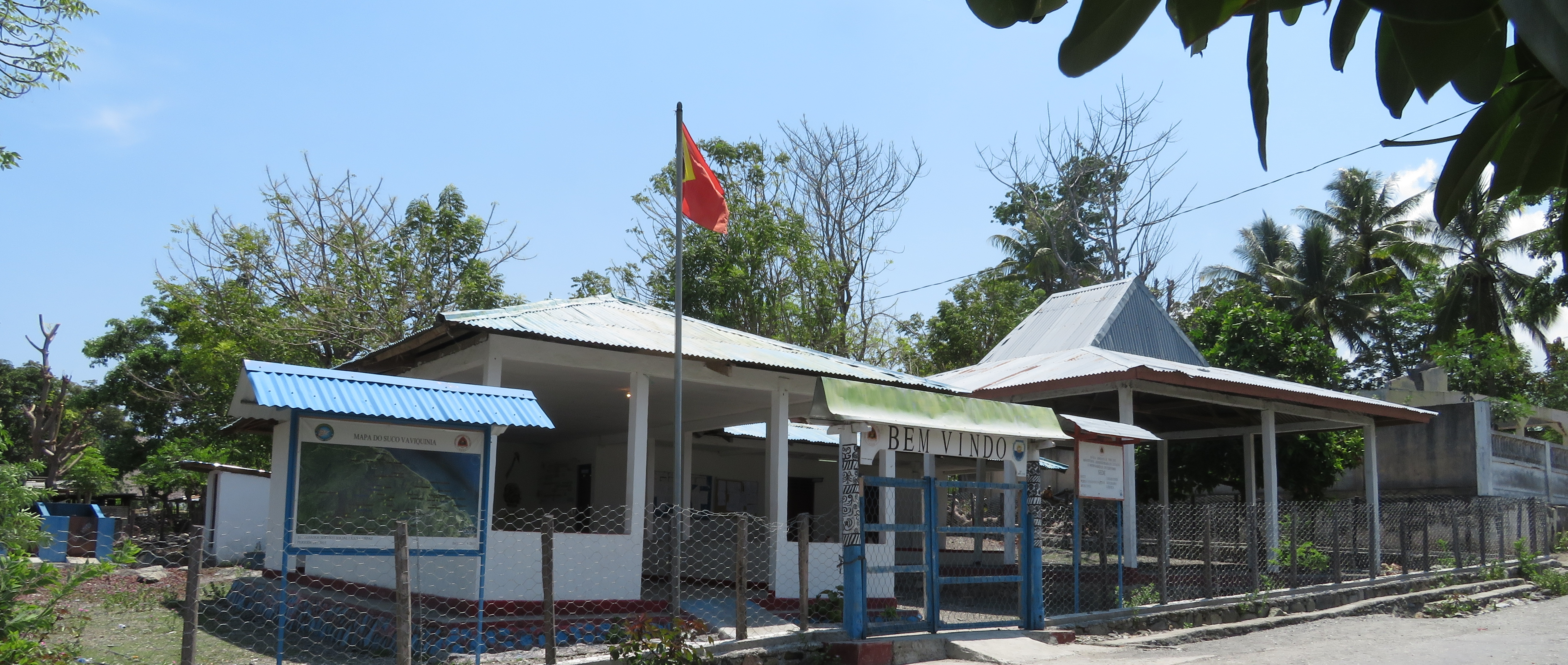 Sitz des Sucos Vaviquinia, Maubara, Timor Leste